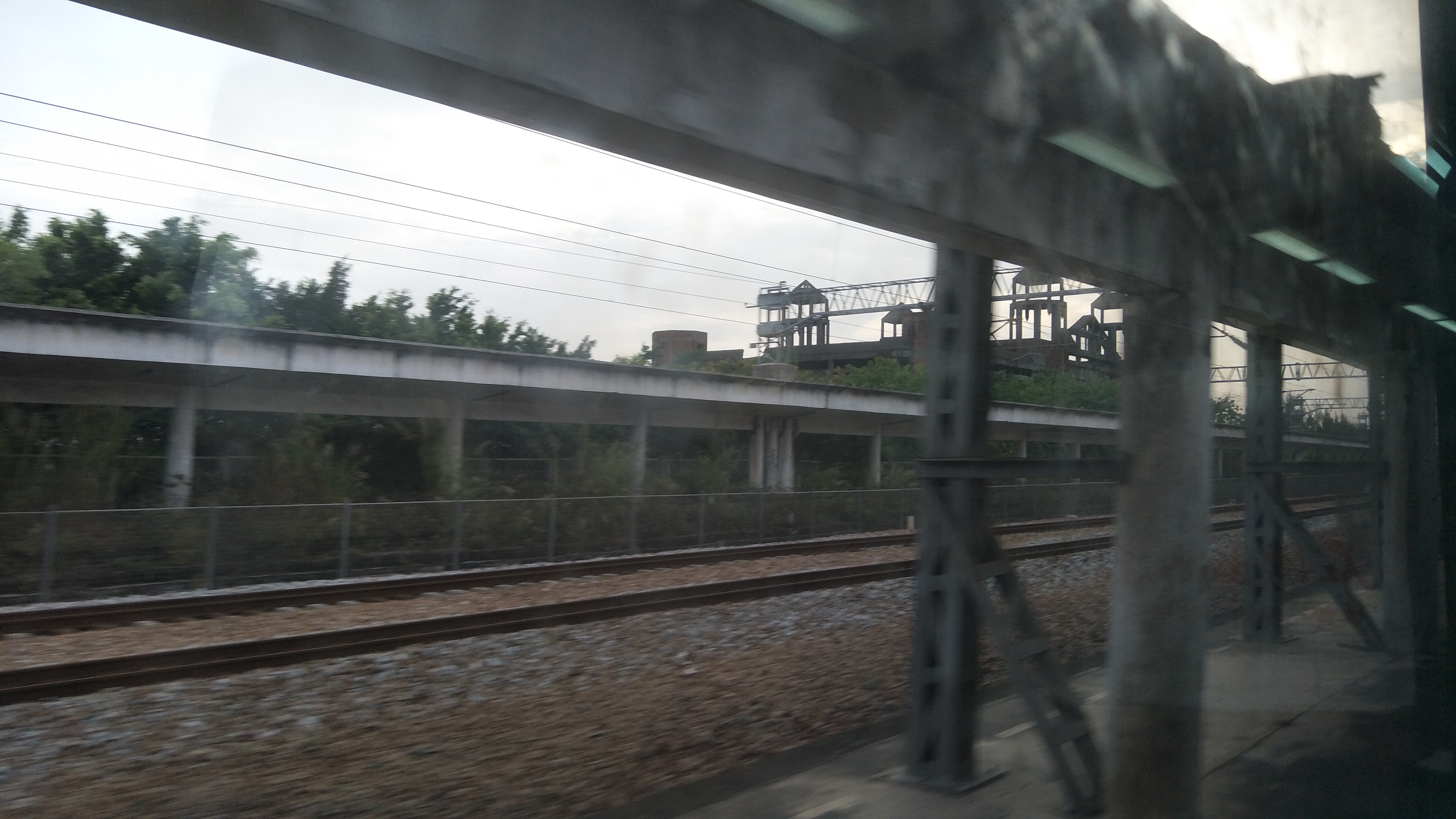 广深铁路石滩站月台（已废弃）